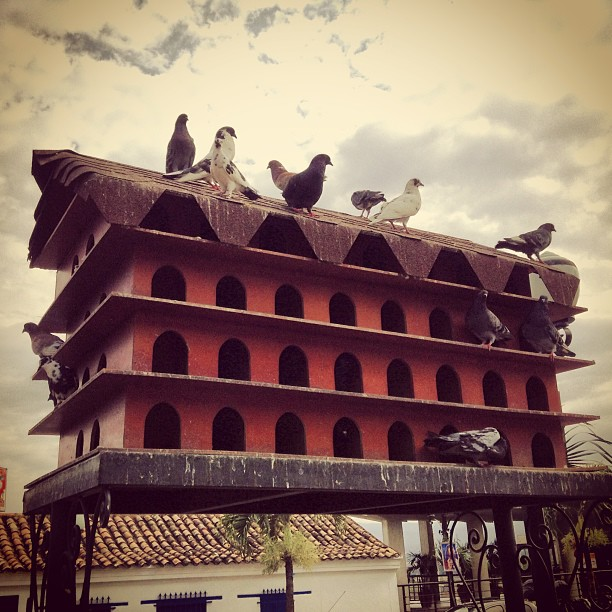 casa para palomas en santa rosa